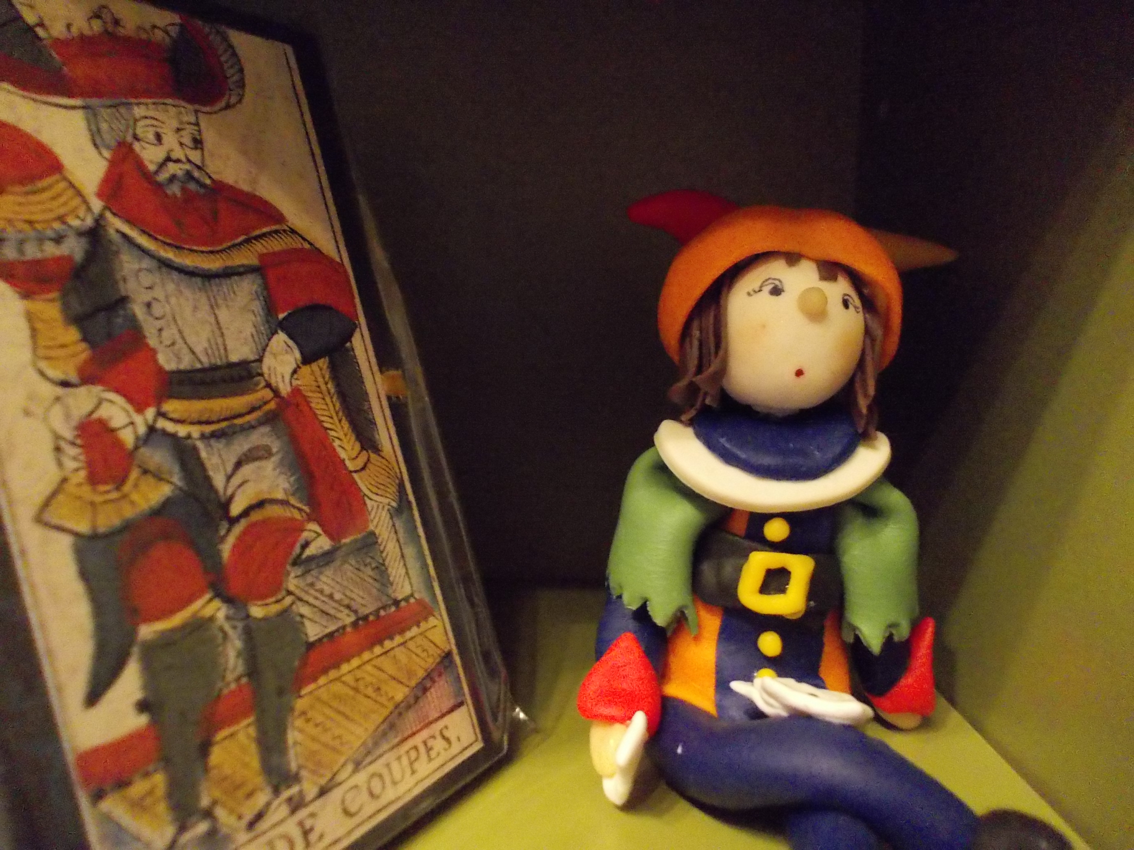 Bookshop Museo dei Tarocchi